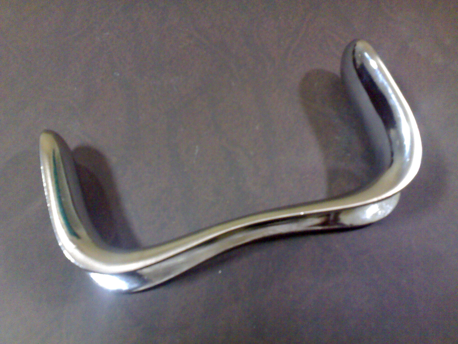 Sim's double-bladed vaginal speculum